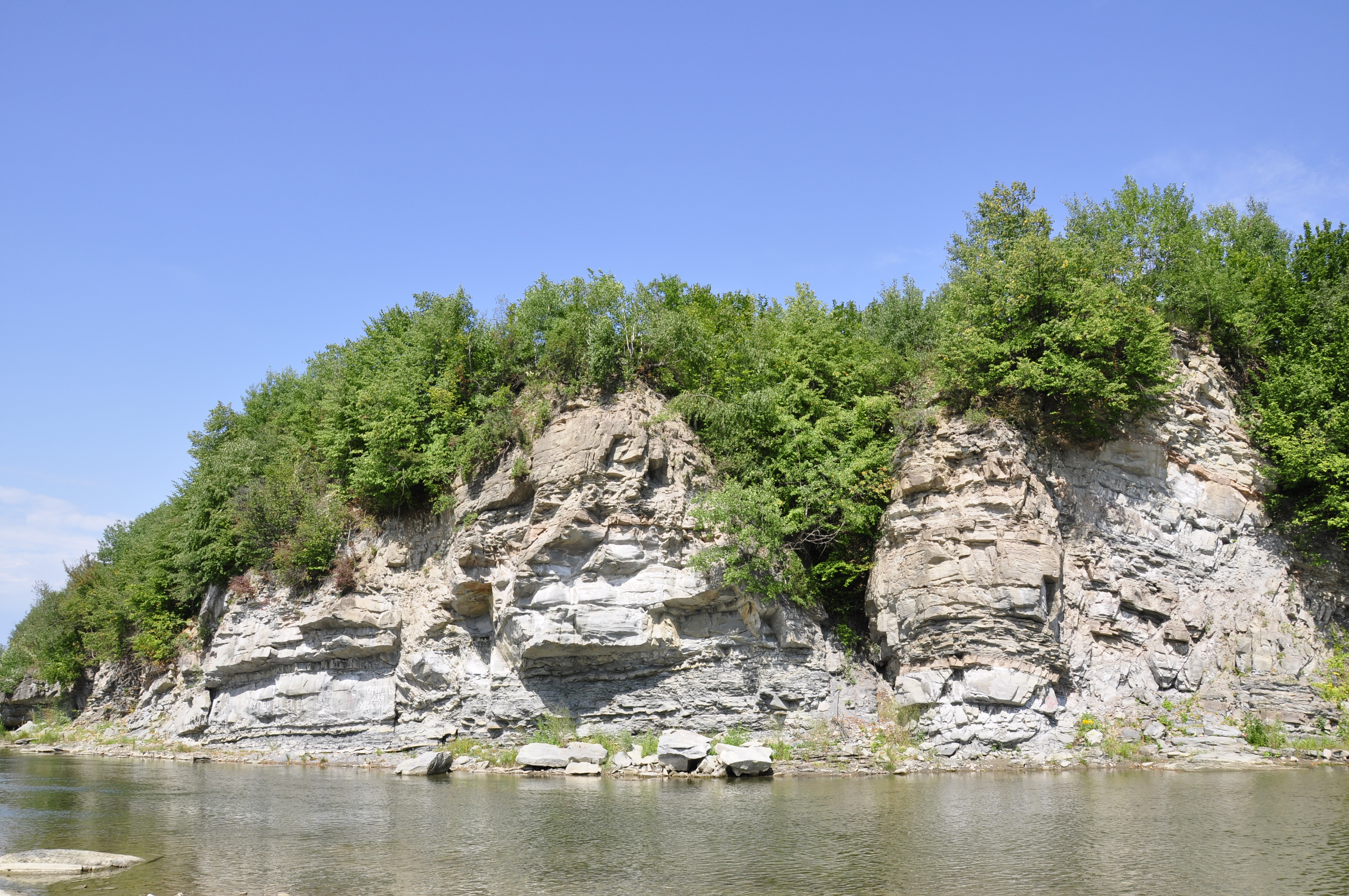 Скеля "Сфінкс"